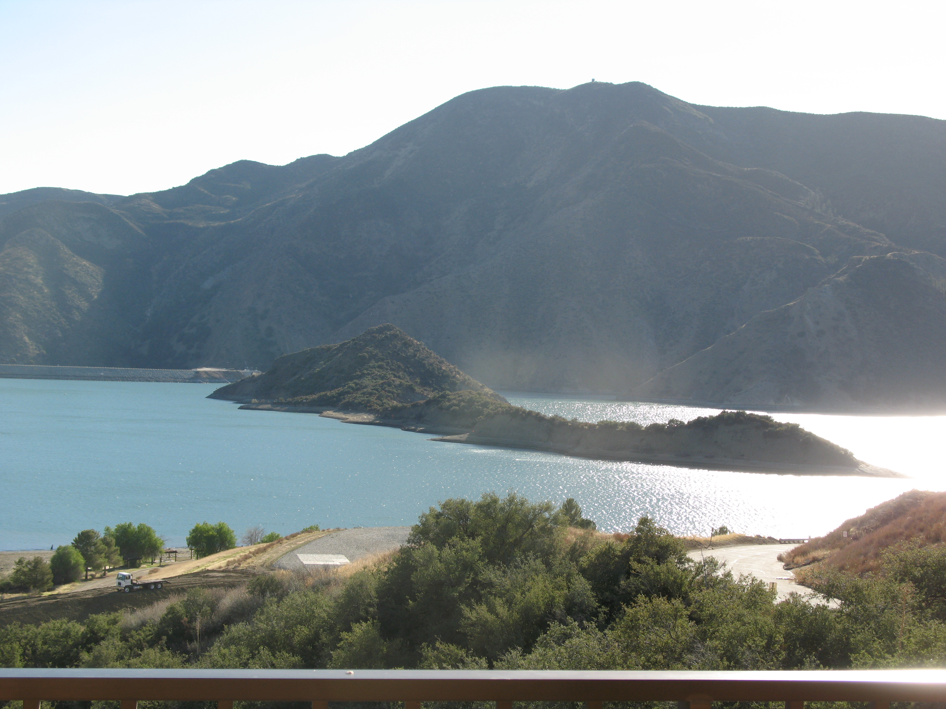 pyramid lake